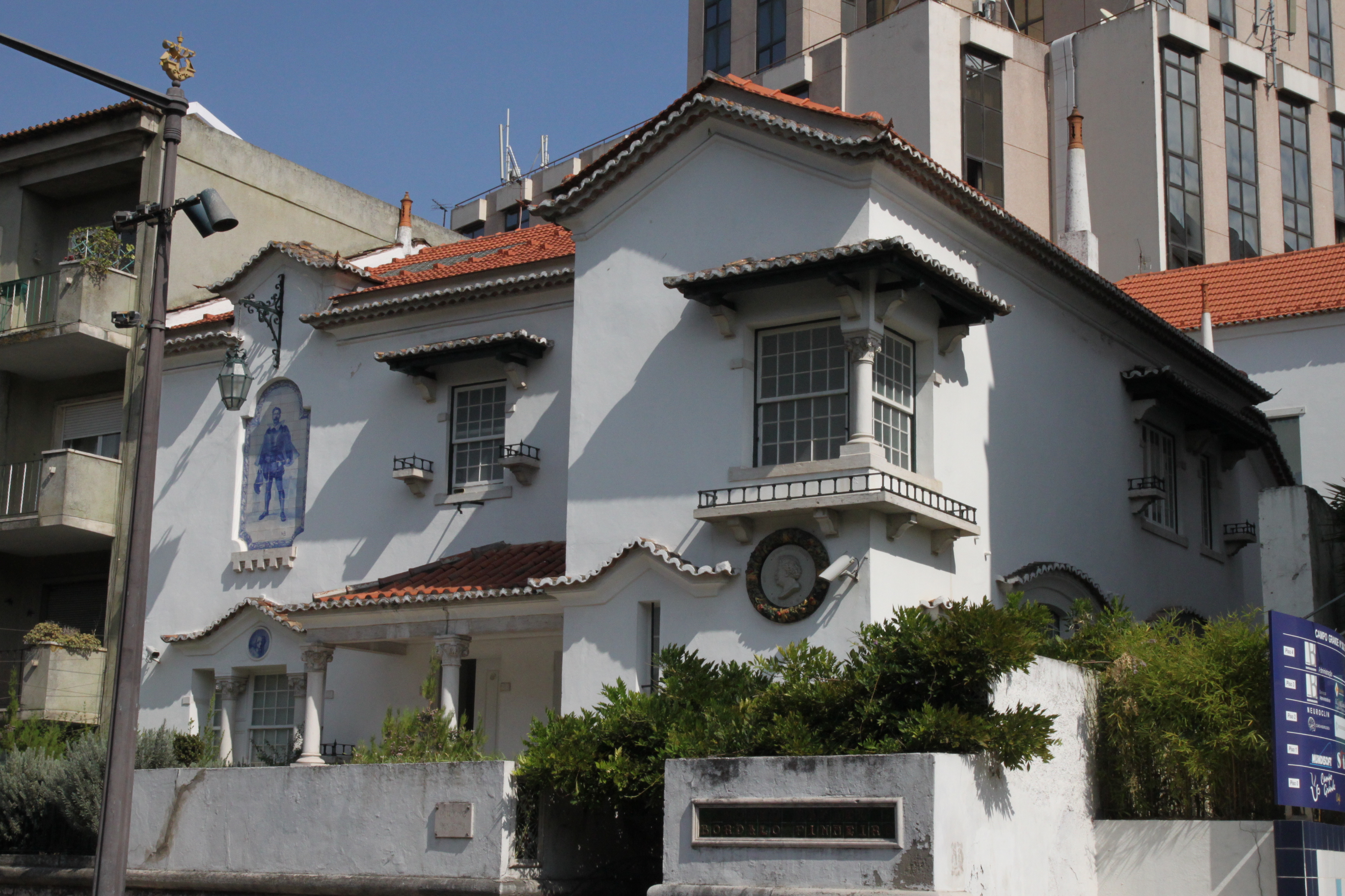 Museu Rafael Bordalo Pinheiro This file was uploaded for Wiki Loves Monuments in Portugal with the unique identifier 97007760.